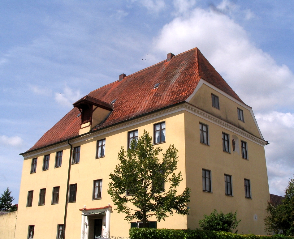 Neustadt an der Donau, Ortsteil Irnsing: ehemaliges Schloss Irnsing